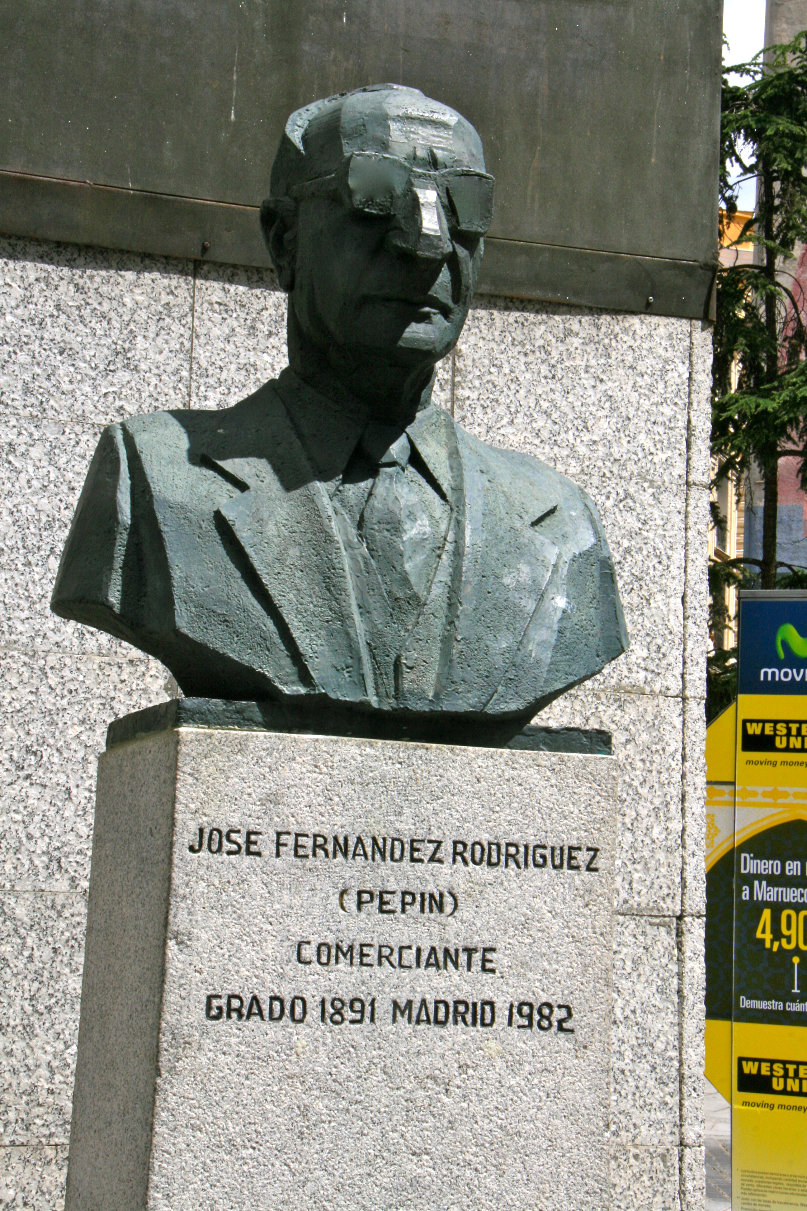 José Fernandez Rodriguez fundador de Galerías Preciados